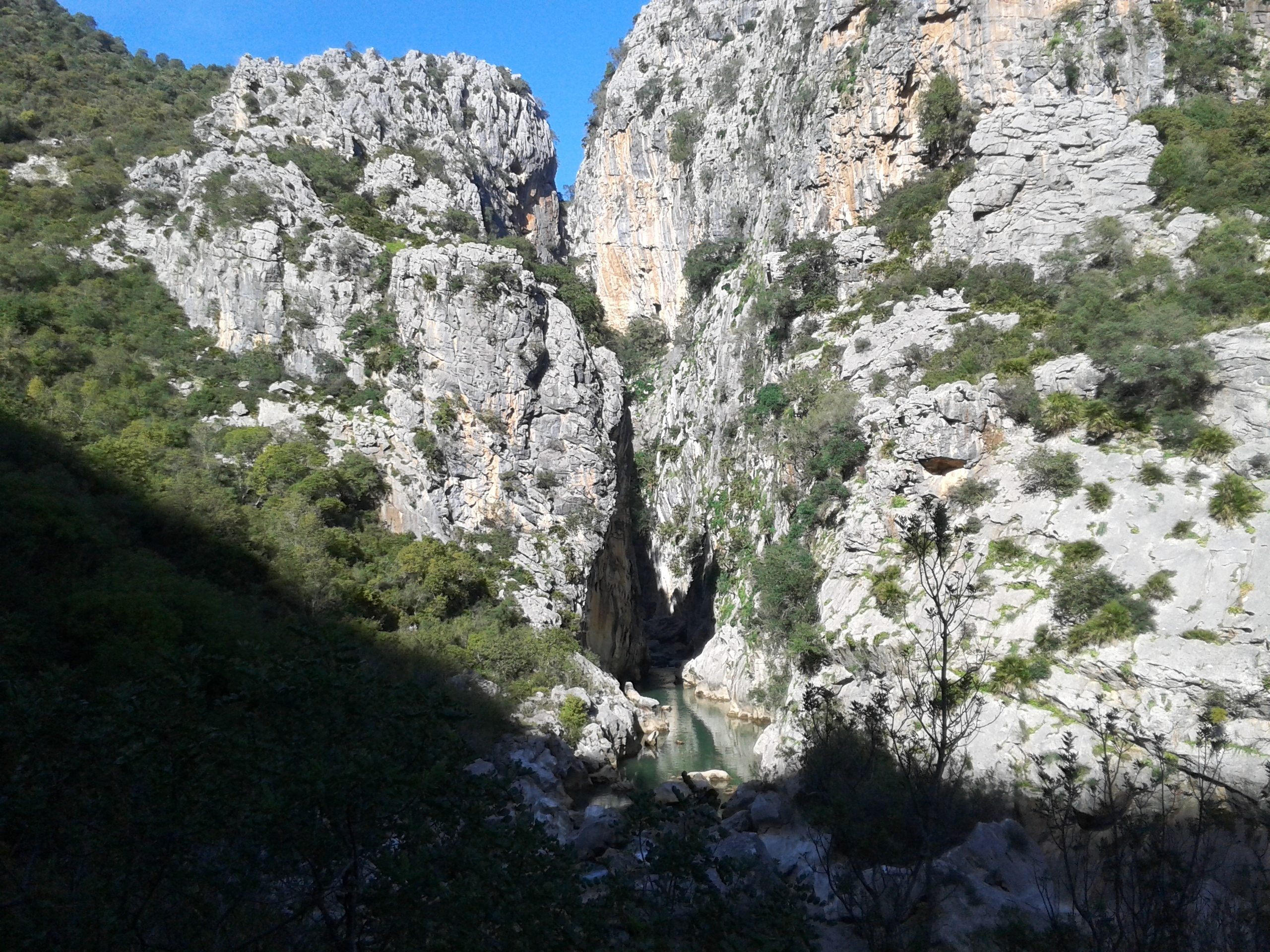 Parque natural de Los Alcornocales This is a photography of a Site of Community Importance in Spain with the ID: ES0000049. Natura2000 entry, EEA entry